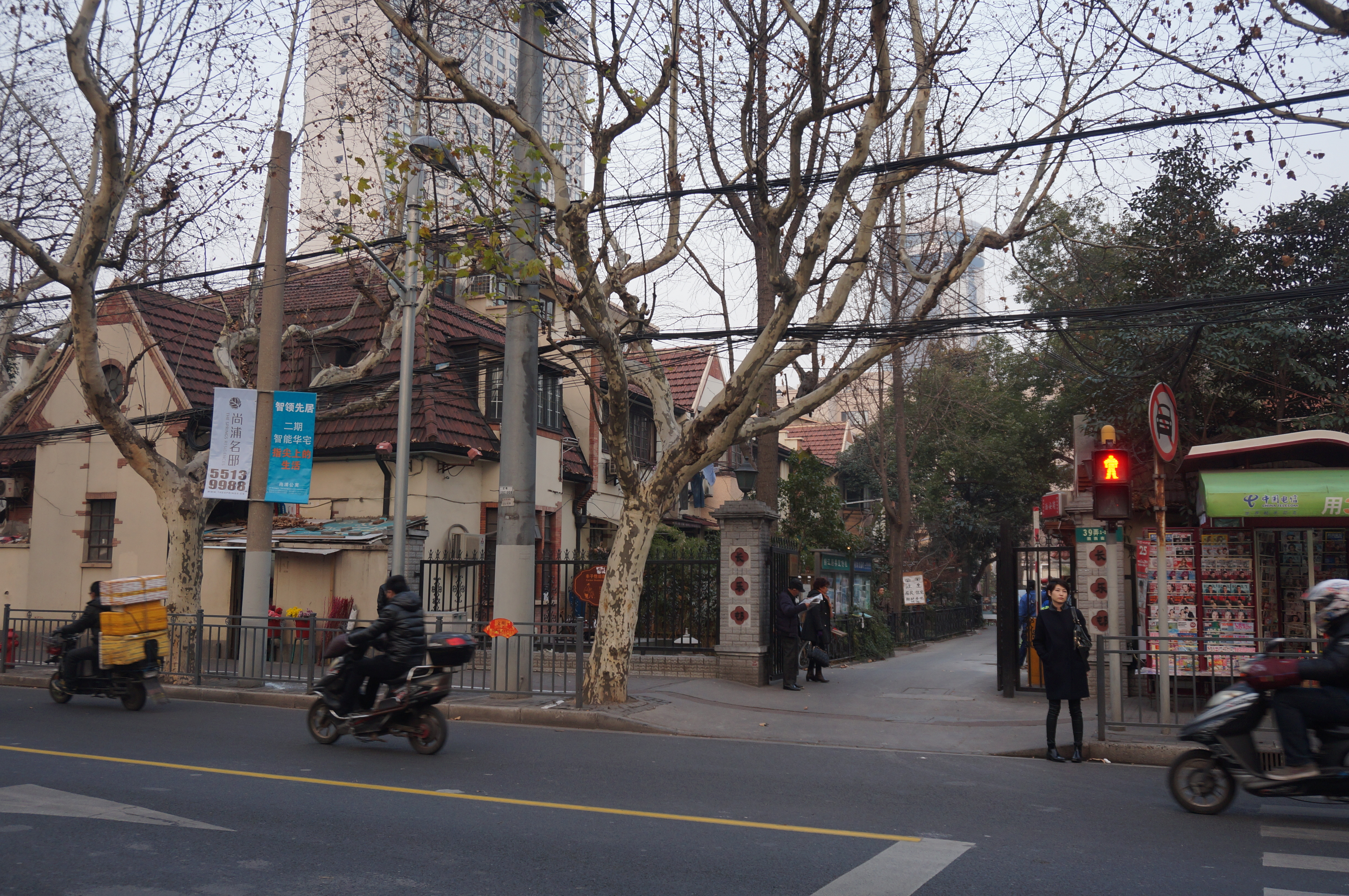 长乐村主入口